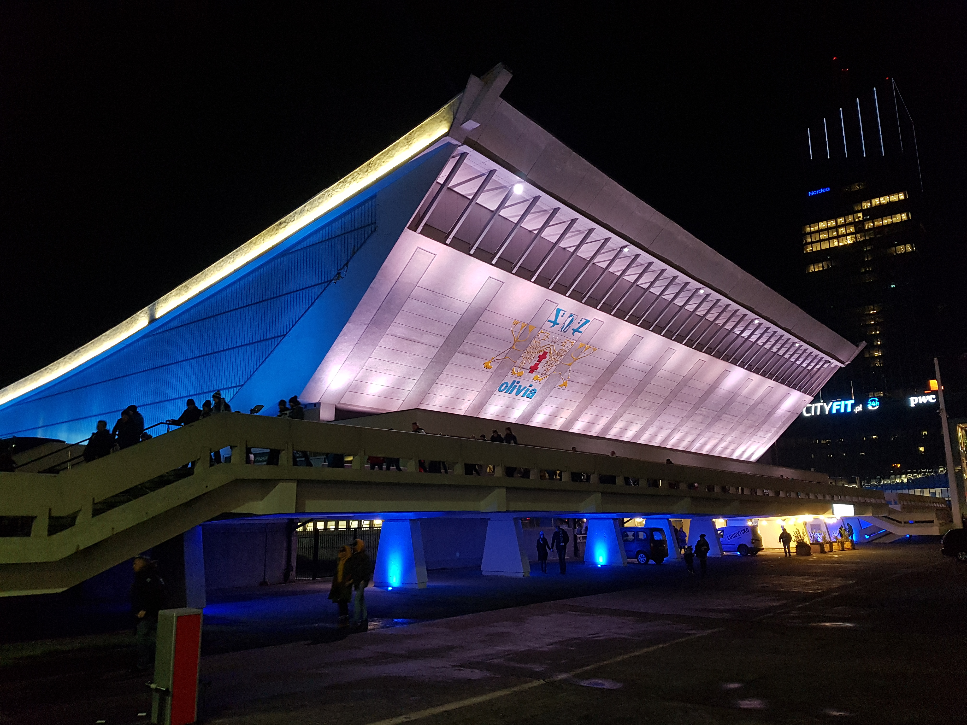 Hala Olivia - zdjęcie wykonane z przodu hali od strony Al. Grunwaldzkiej. W tle widoczne budynki Olivia Business Centre.